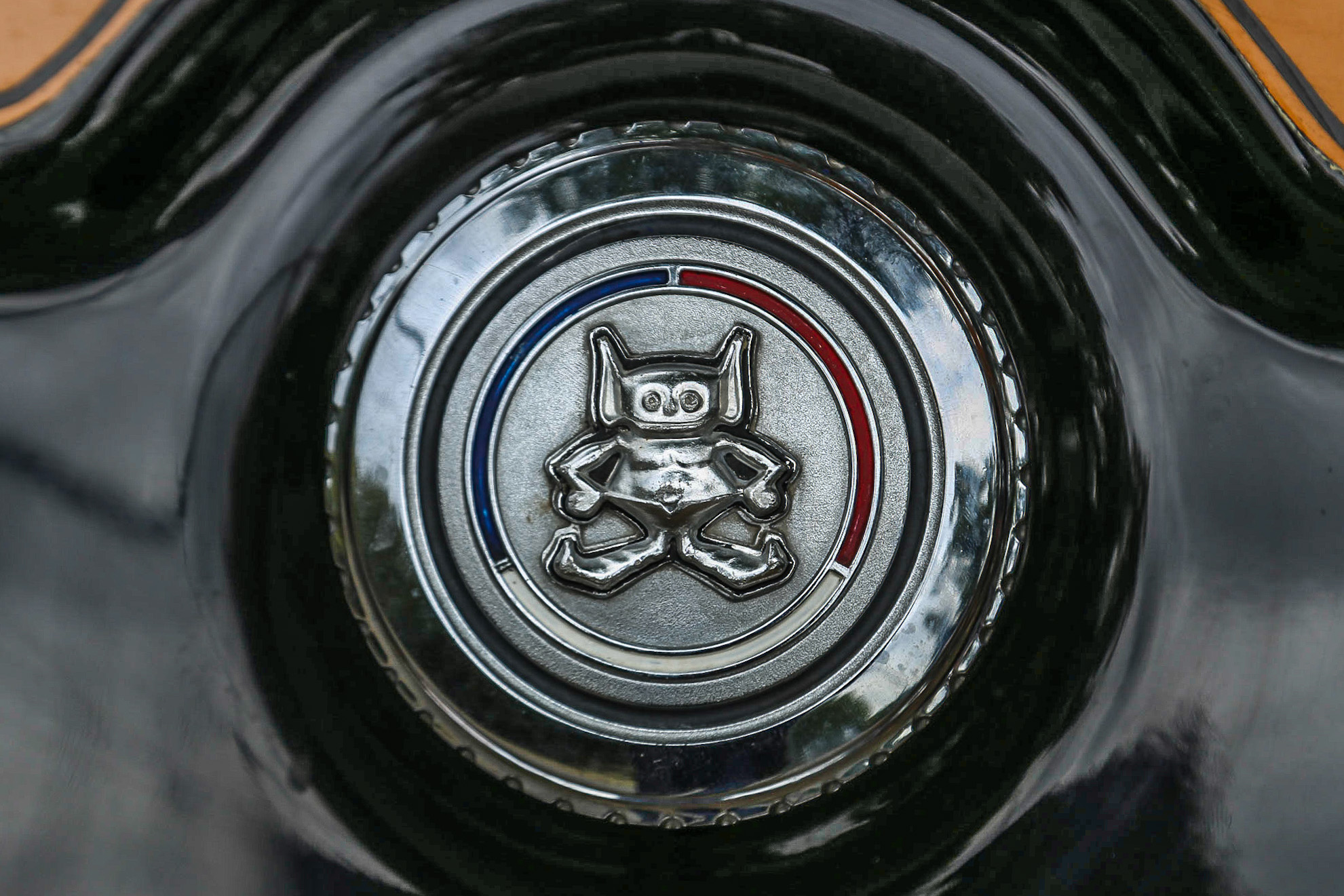 Logo des Gremlins auf gleichnamigen AMC